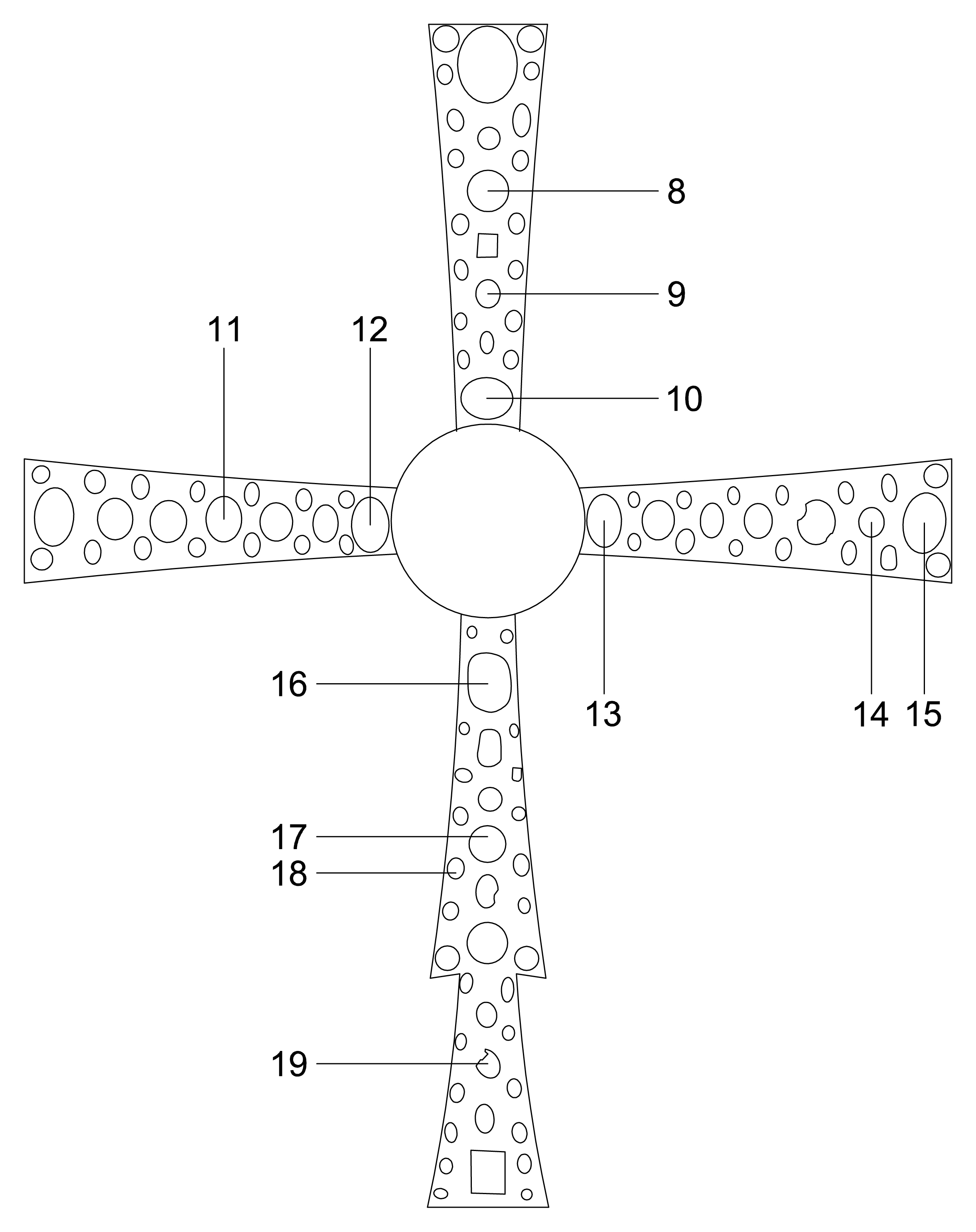 Croce di Desiderio, IX secolo, museo di Santa Giulia, Brescia (restituzione grafica)